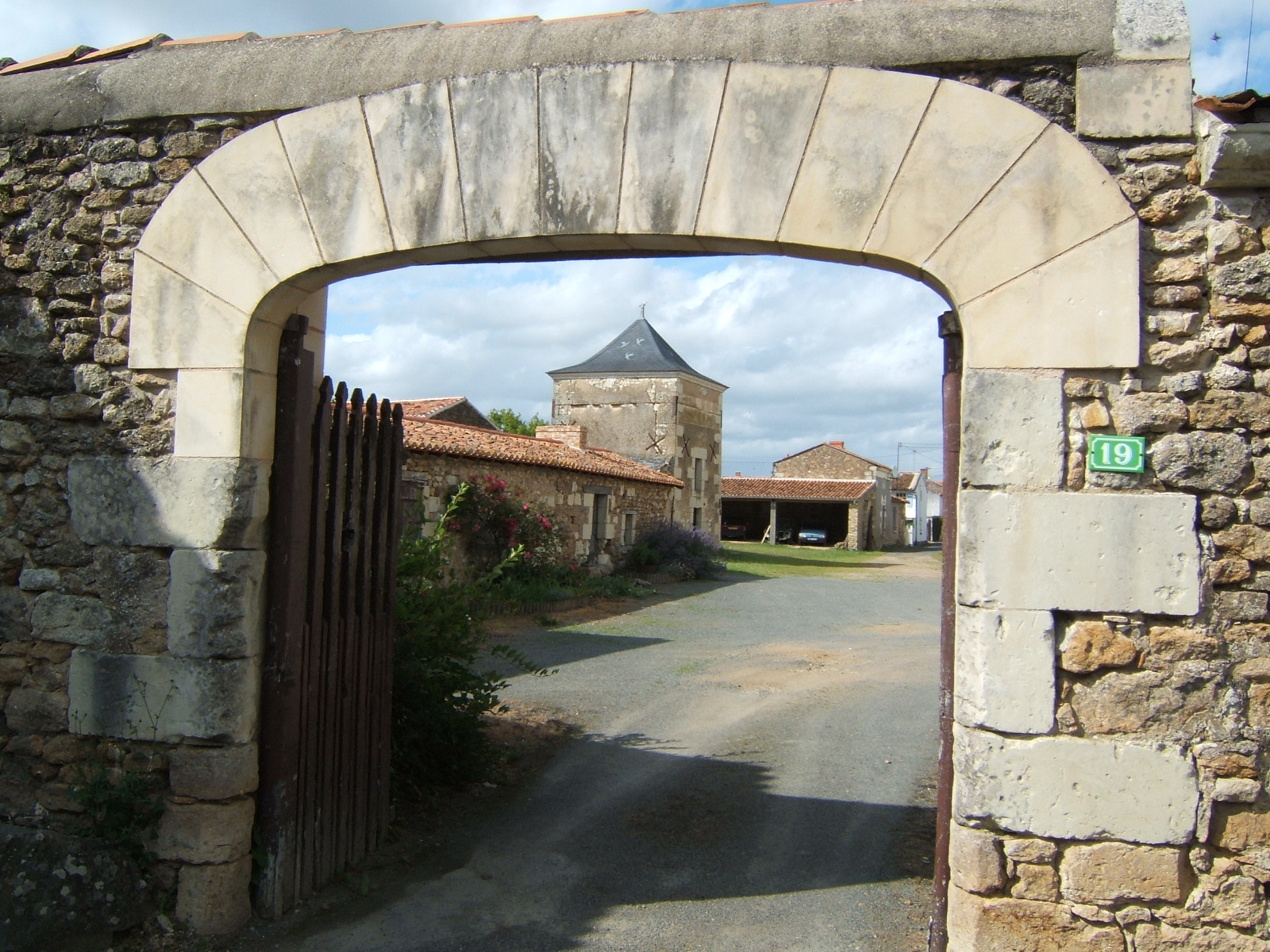 Photographie du centre village de Taizon